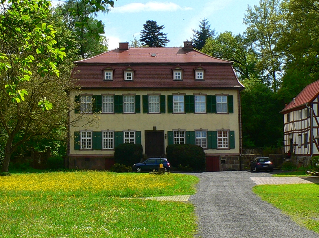 Herrenhaus Oberurff in Bad Zwesten-Oberurff, Hessen, Regierungsbezirk Kassel, Schwalm-Eder-Kreis